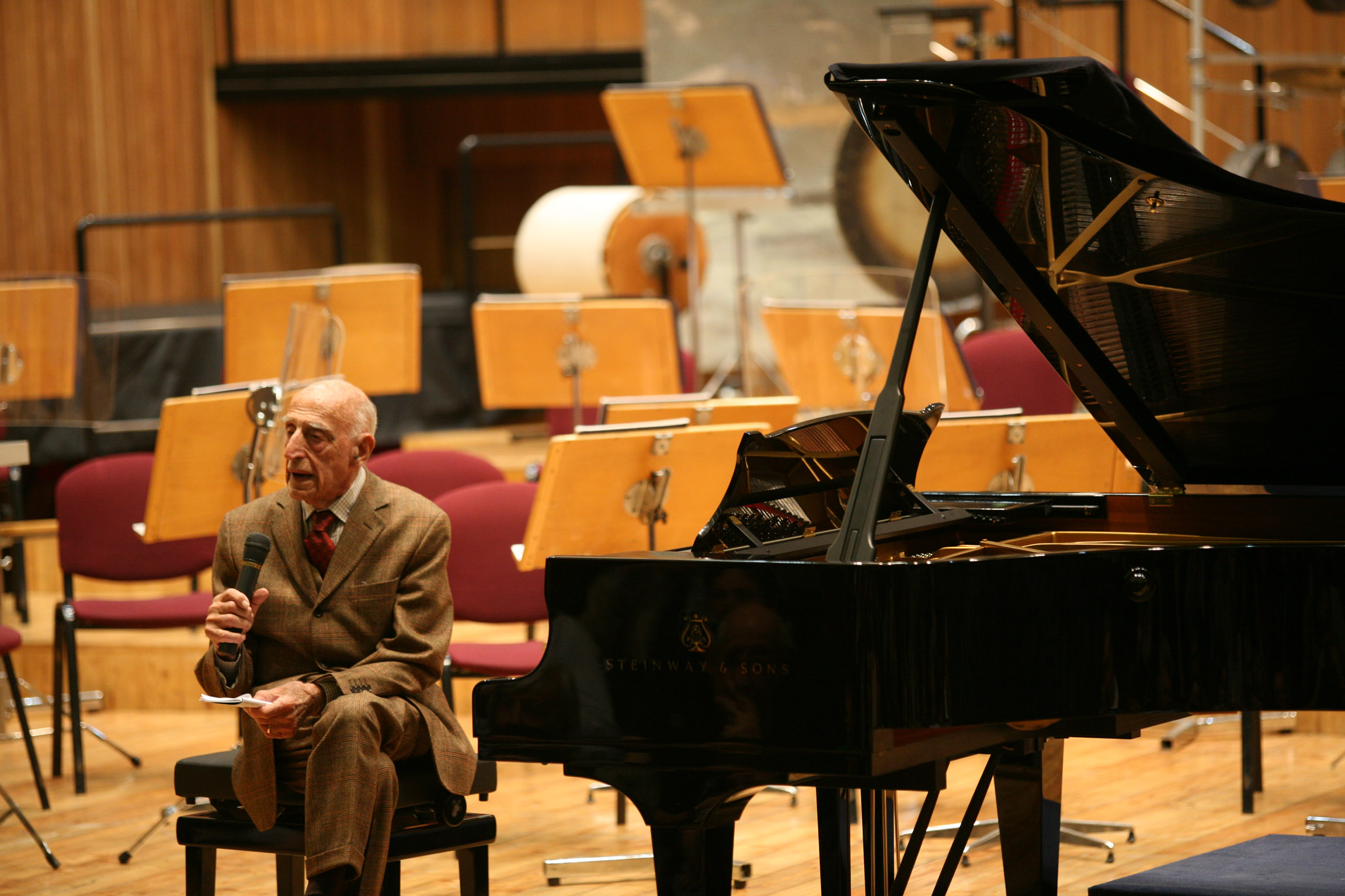 Milano, Conservatorio, Gillo Dorfles, Ensemble intercontemporain diretta da Susanna Mälkki, musiche di Olivier Messiaen ©Lelli e Masotti